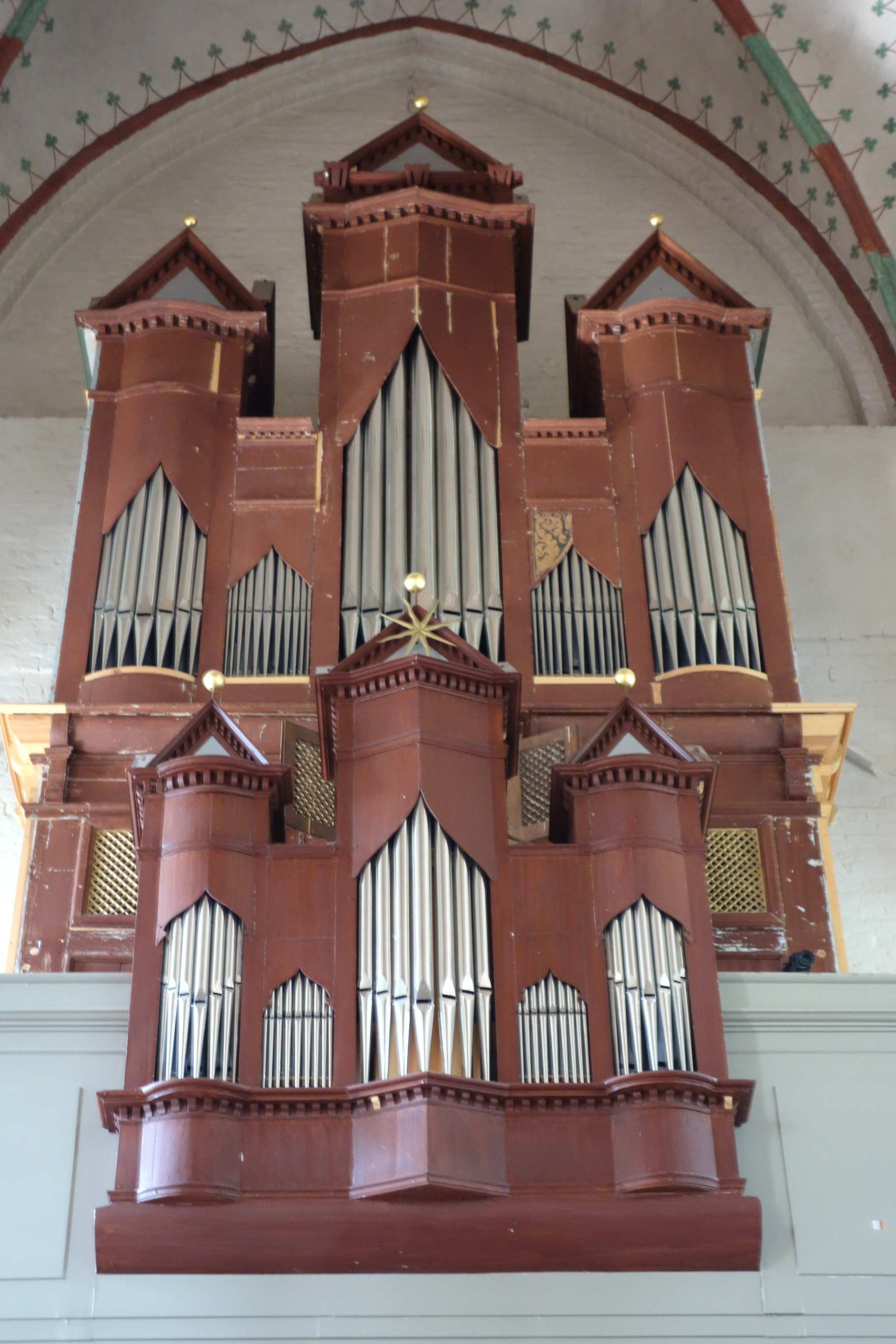 Orgel St. Vicelinkirche, Neumünster, Schleswig-Holstein, Deutschland